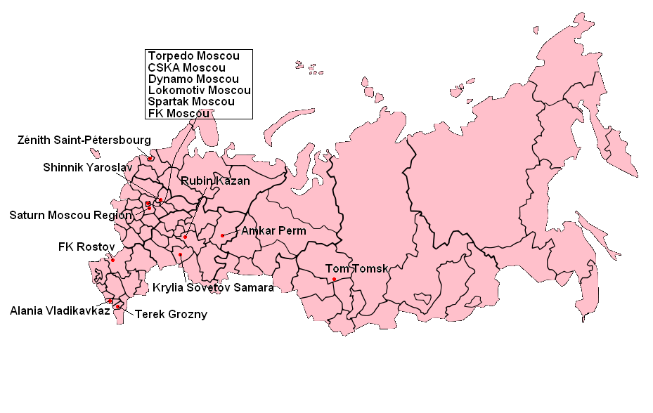 Participants à la Premier League 2005.